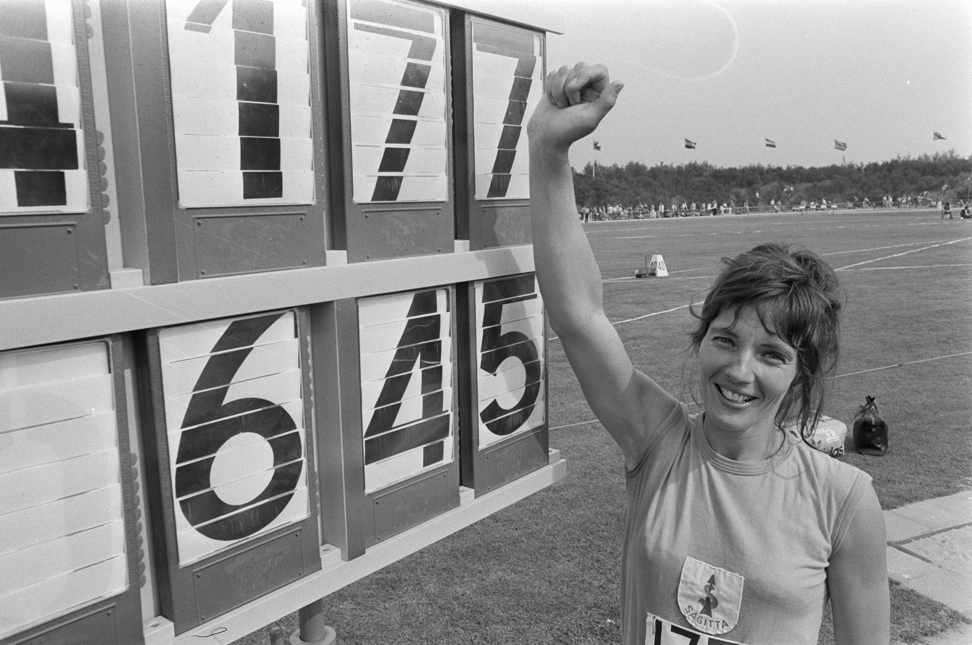 Collectie / Archief : Fotocollectie Anefo Reportage / Serie : [ onbekend ] Beschrijving : Nederlandse atletiekkampioenschappen 1974 op Papendal; een gelukkige Ciska Janssen bij het scorebord Datum : 3 augustus 1974 Trefwoorden : atletiek, kampioenschappen Persoonsnaam : Jansen, Ciska, Janssen-Jansen, Ciska Instellingsnaam : Papendal Fotograaf : Verhoeff, Bert / Anefo Auteursrechthebbende : Nationaal Archief Materiaalsoort : Negatief (zwart/wit) Nummer archiefinventaris : bekijk toegang 2.24.01.05 Bestanddeelnummer : 927-3671